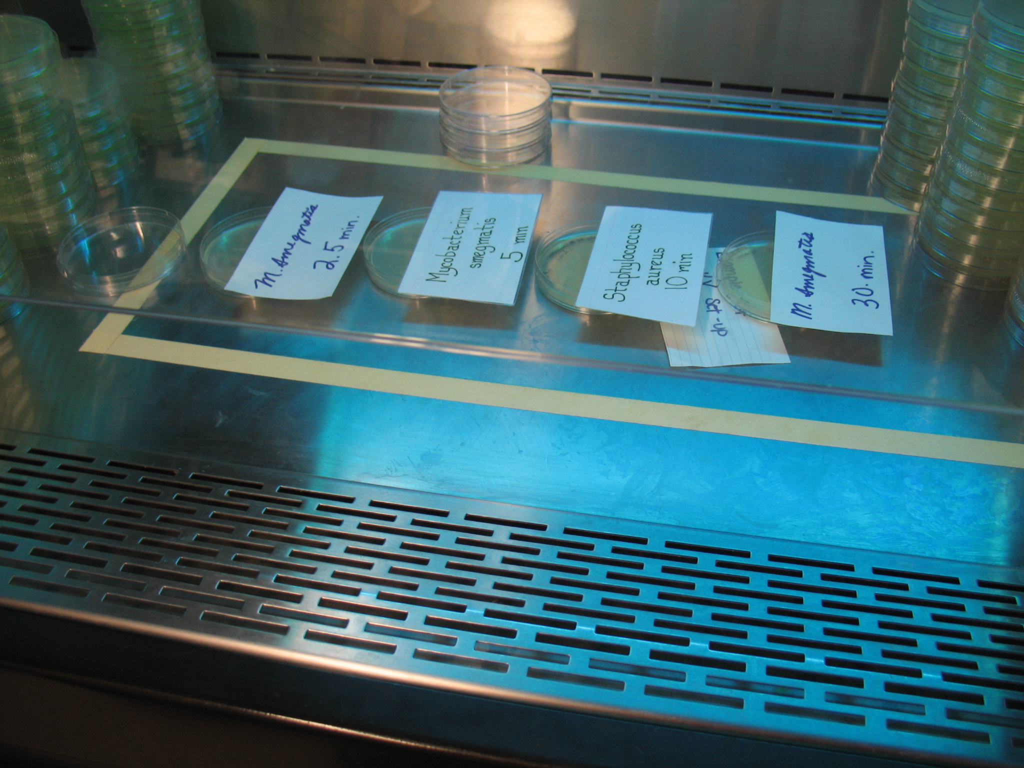 Eksperyment badający bakteriobóczy wpływ promieniowania ultrafioletowego. Połowa szalki przykryta jest kartką papieru, uniemożliwiająca penetrację przez UV. Druga połowa szalki jest niczym nie osłonięta. Teoretycznie, w zależności od czasu naświetlenia, ultrafiolet powinien zabić mikroorganizmy na niechronionej części szalki.